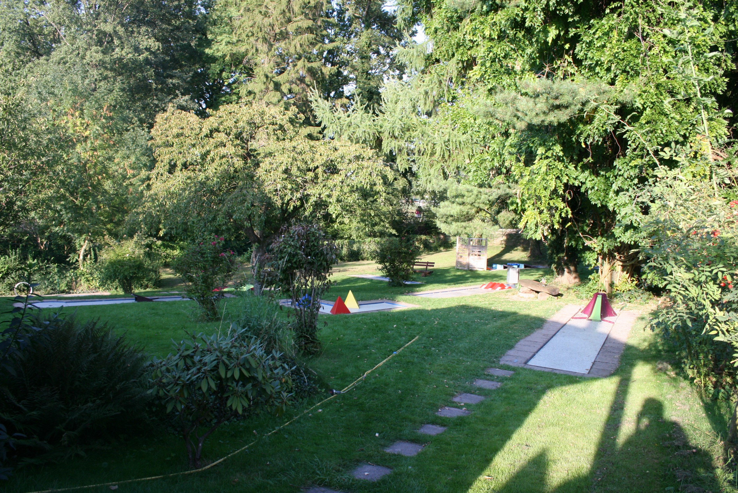 Der Minigolfplatz des Campingsplatzes Seewiese am Buchhorner See in Pfedelbach-Buchhorn